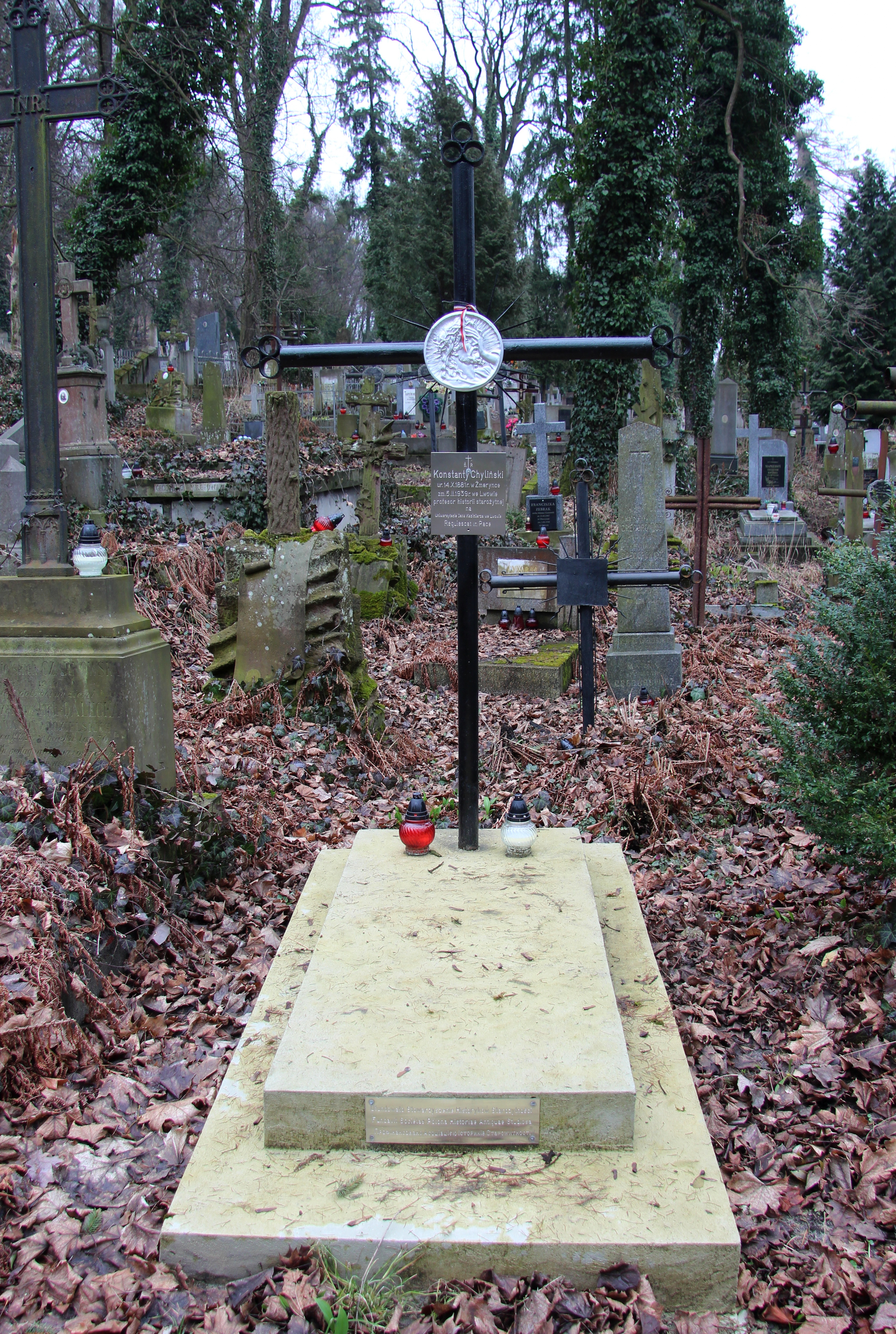 Cmentarz na Łyczakowie we Lwowie - grób Konstantego Chylińskiego (pole nr 20)